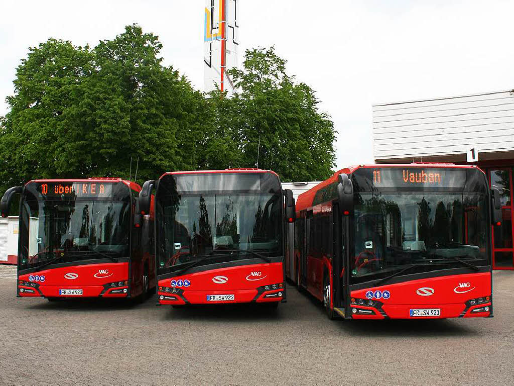 3 Neue Solaris Busse der VAG-Freiburg stehen auf dem Betriebshof.